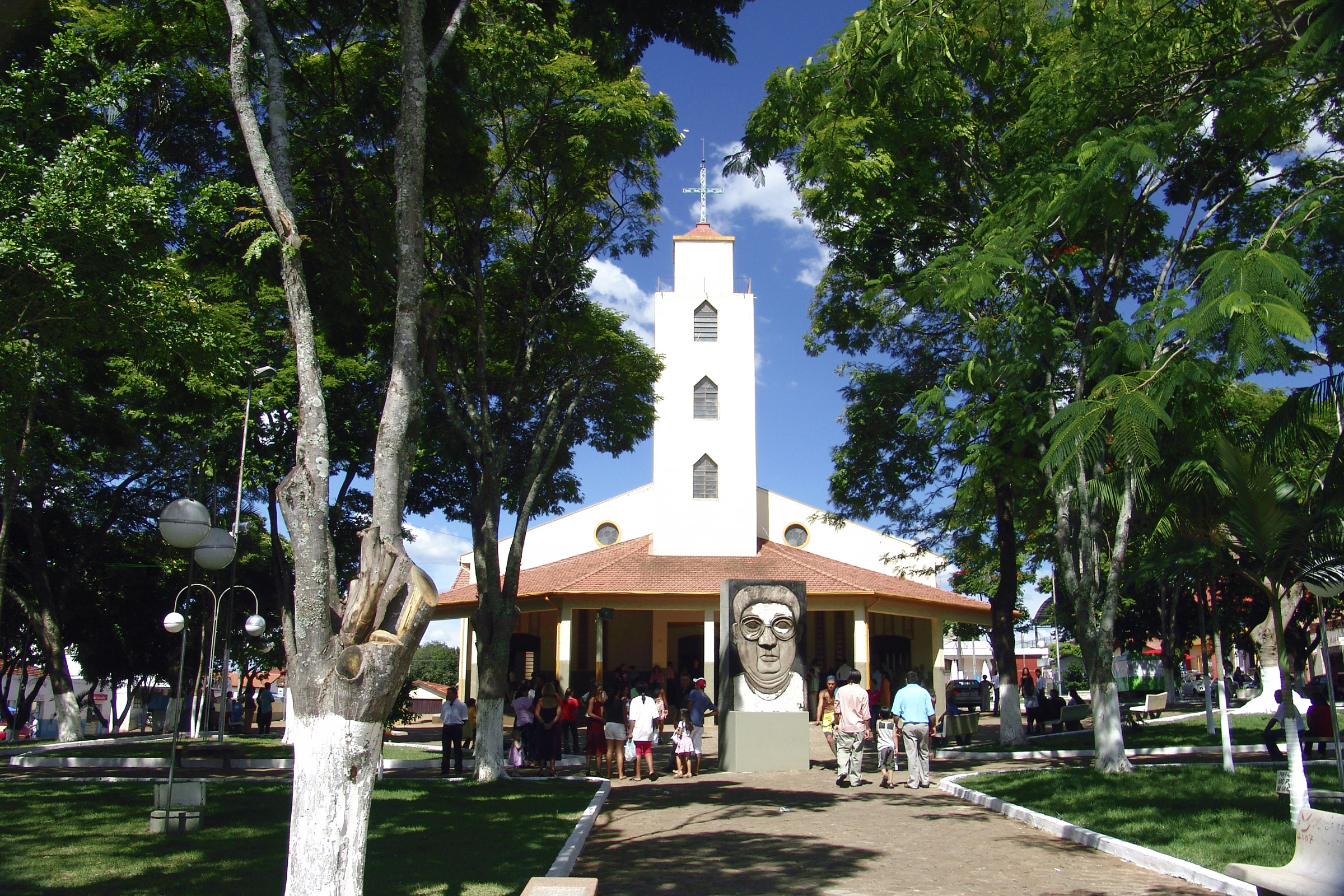 Igreja no município de Coronel Macedo, São Paulo, Brasil